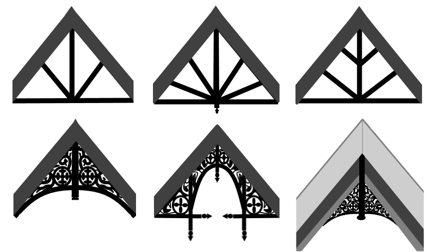 Exemples de décoration de pignon en Scandinavie